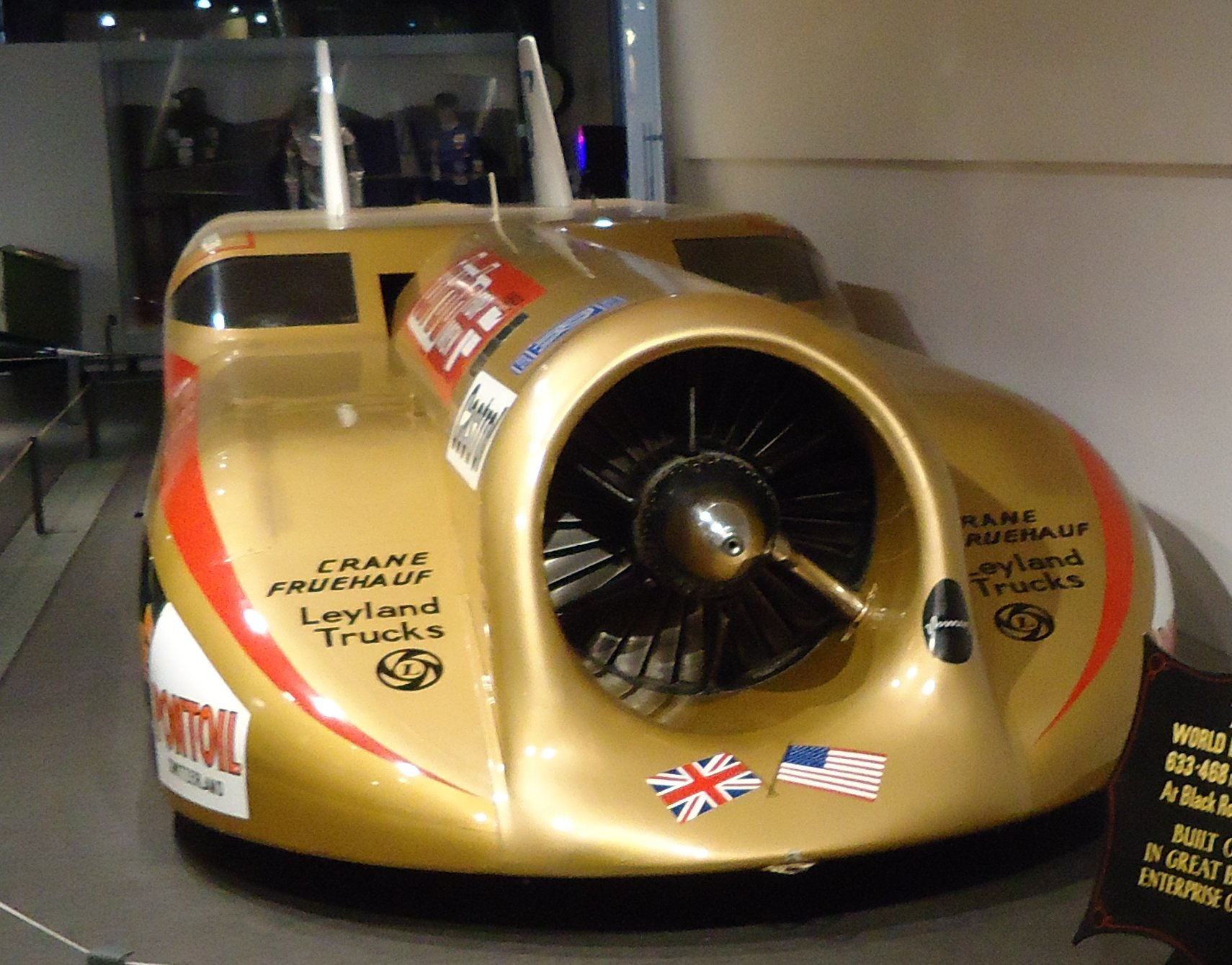 Museo del Transporte de Coventry